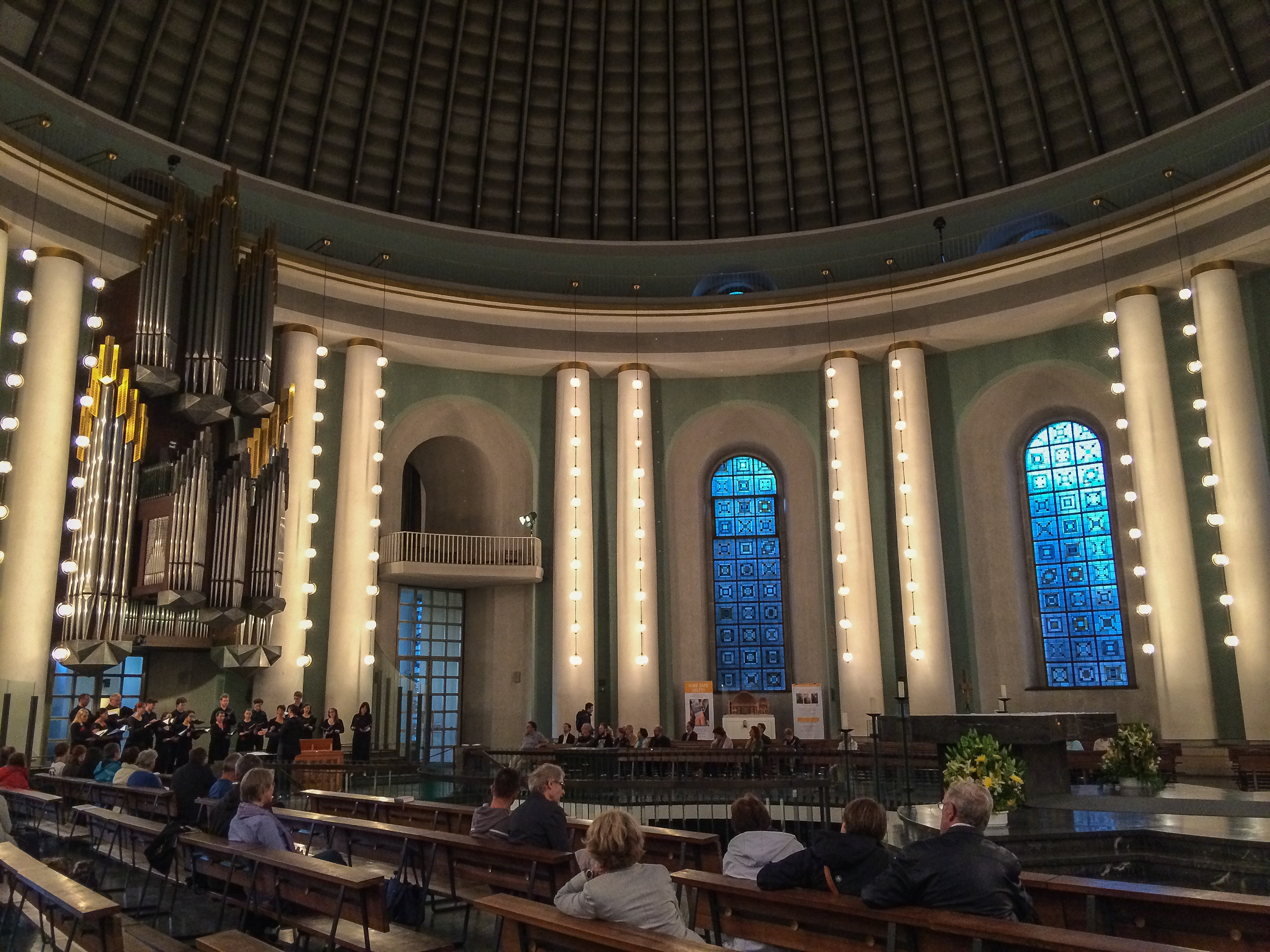 Innenansicht der St. Hedwigs Kathedrale (Juni 2014)